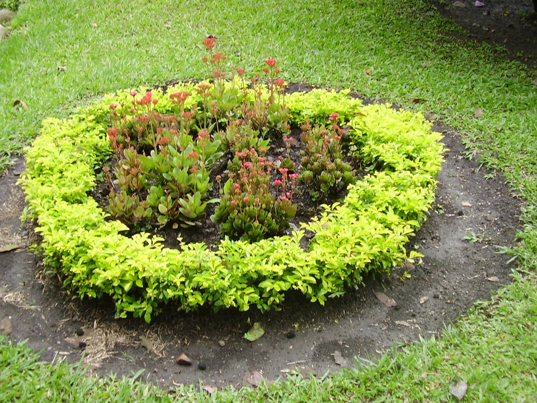 parque central del museo de la caña, en Santa Elena El Cerrito VAlle